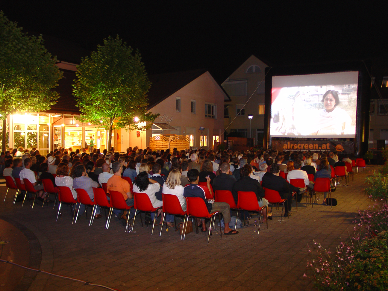 Open-Air-Kino in Nenzing